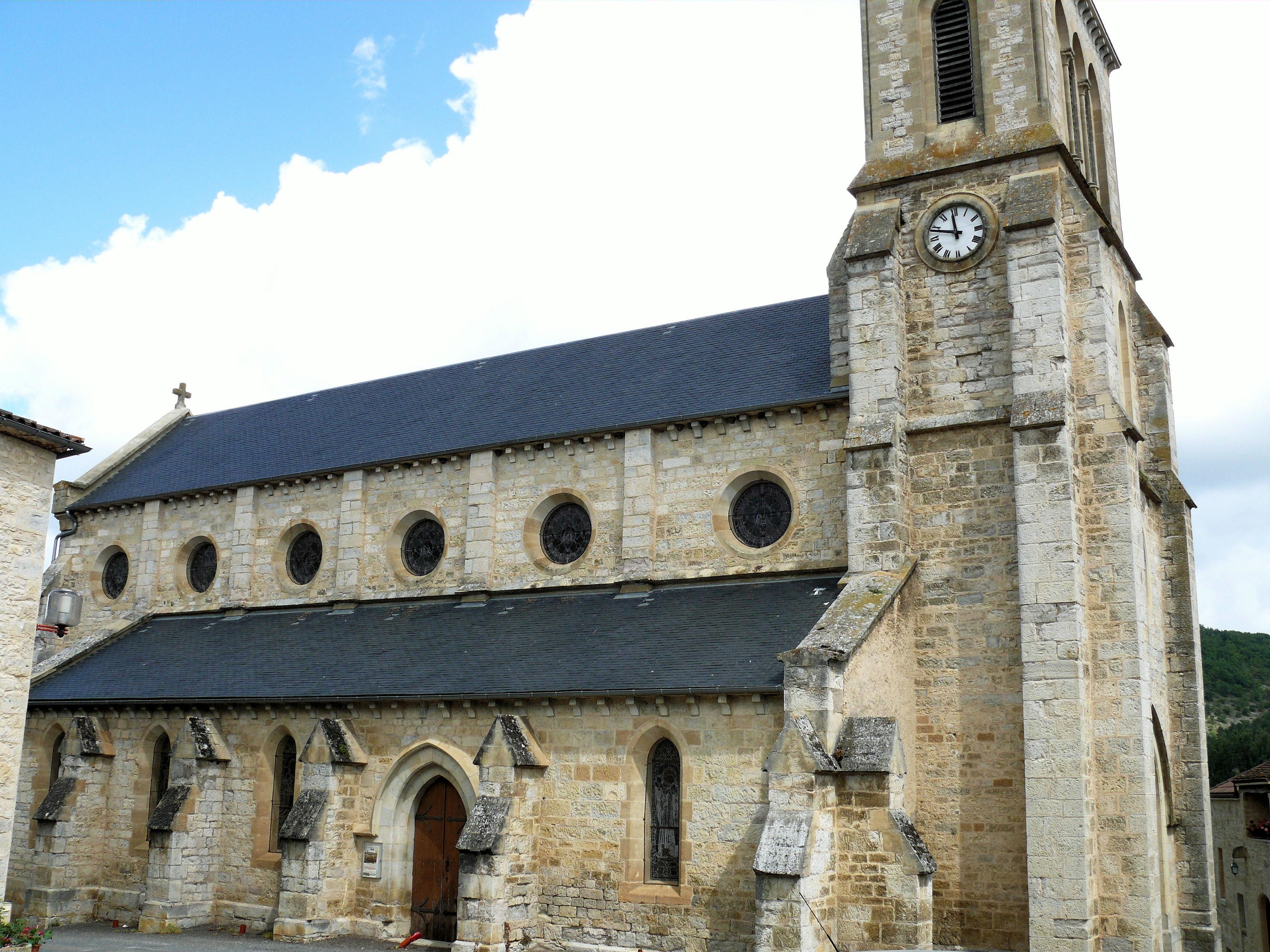 Saint-Germain-du-Bel-Air - Eglise Saint-Germain-l'Auxerrois